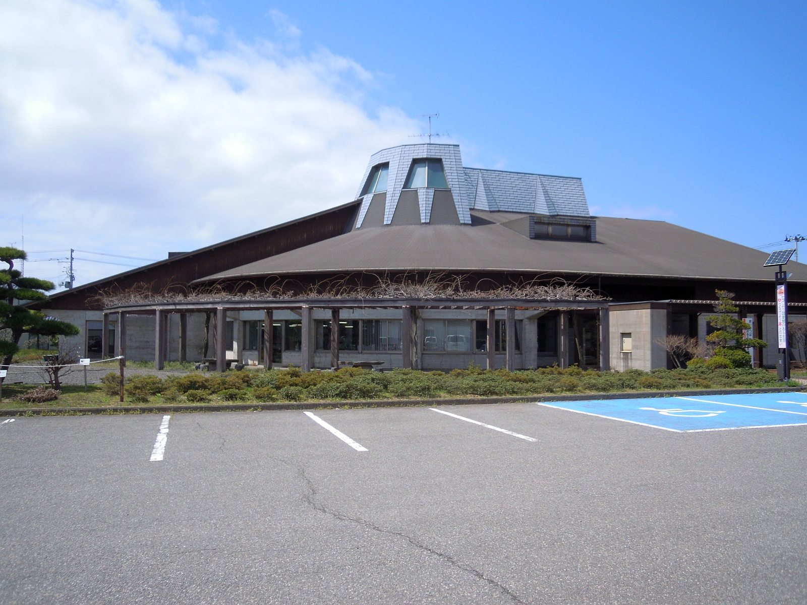 山形県飽海郡遊佐町にある遊佐町立図書館の外観